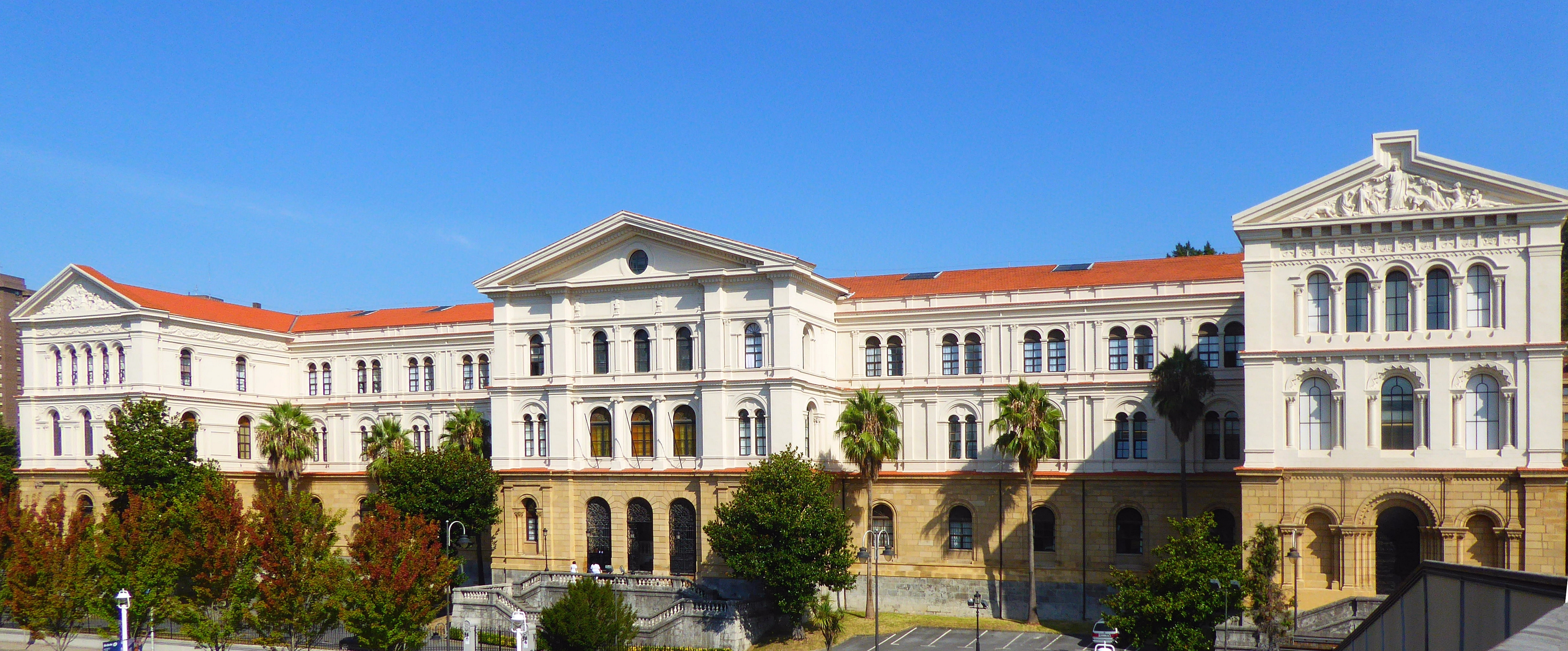 Universidad de Deusto en Bilbao y San Sebastián. Ursprung 1886. Private Universität in jesuitischer Trägerschaft. Hauptgebäude am Fluss Nervion in Bilbao Baskenland Spanien Foto Wolfgang Pehlemann P1060032